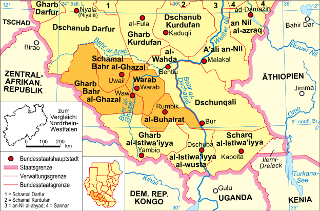 politische Karte des Sudan (Region Bahr al-Ghazal)